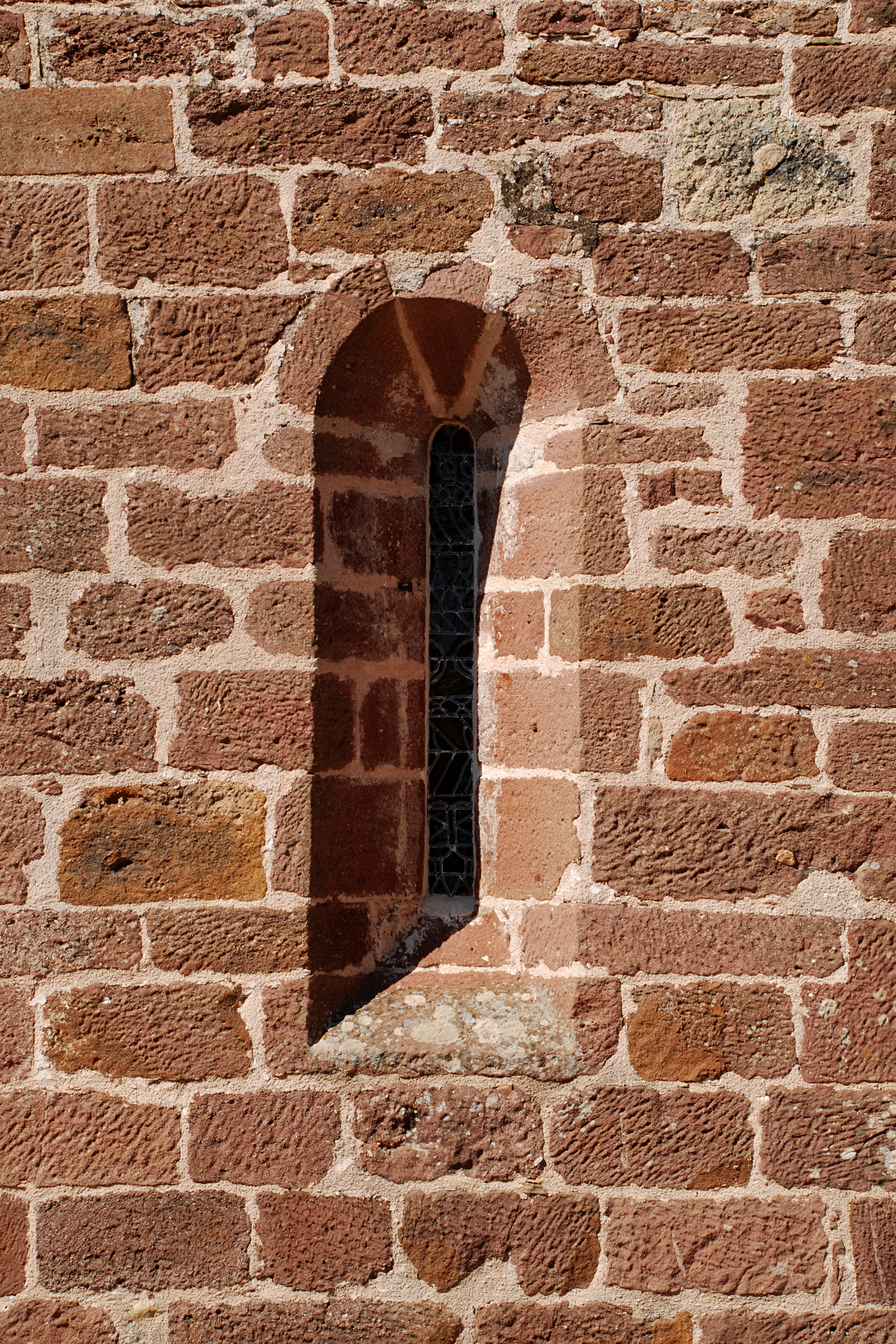 France - Languedoc - Hérault - La Tour-sur-Orb - Église Sainte-Marie de Frangouille